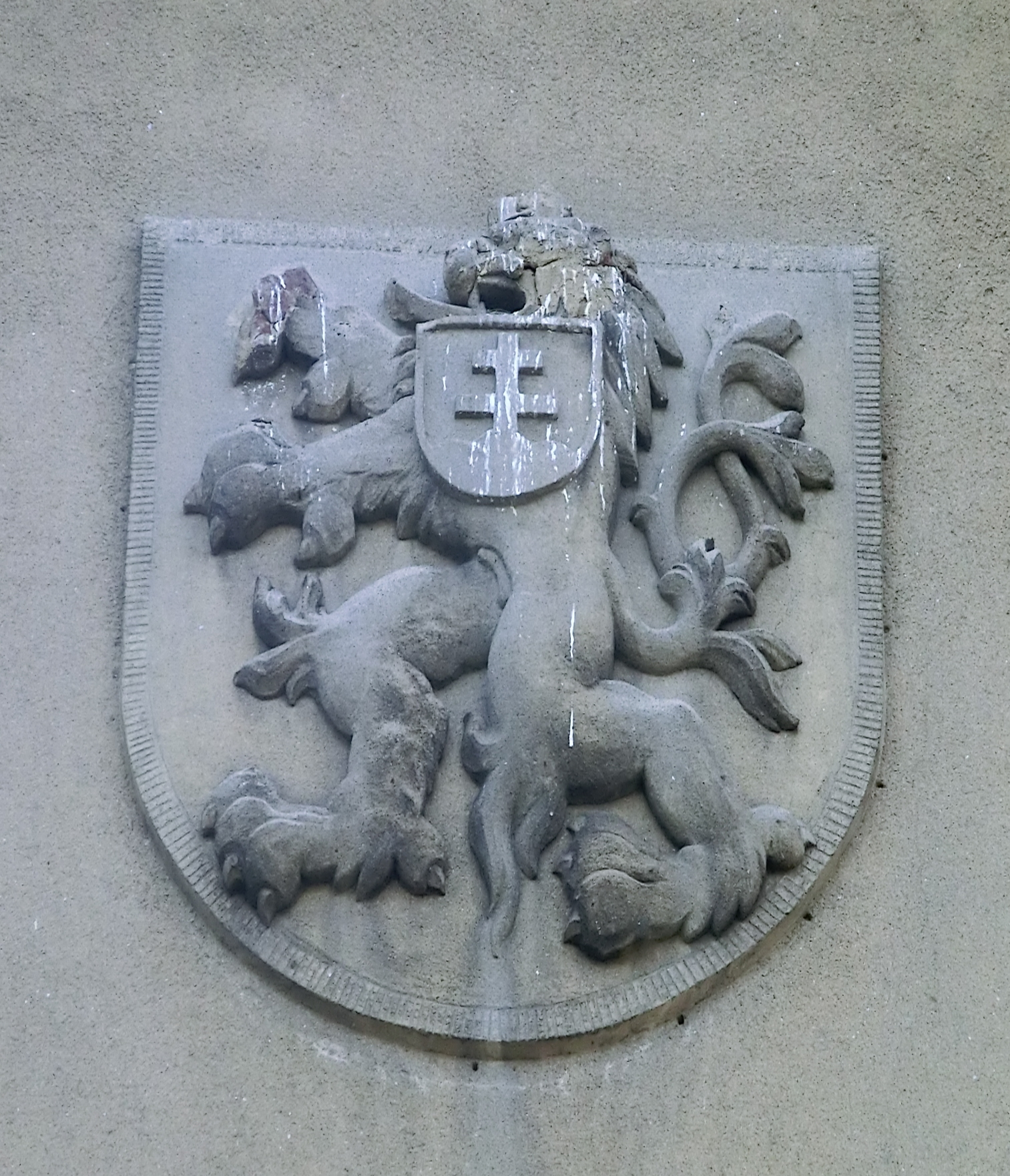 Budova pošty (bývalého Okresního soudu) v Jilemnici - malý státní znak Republiky československé v průčelí